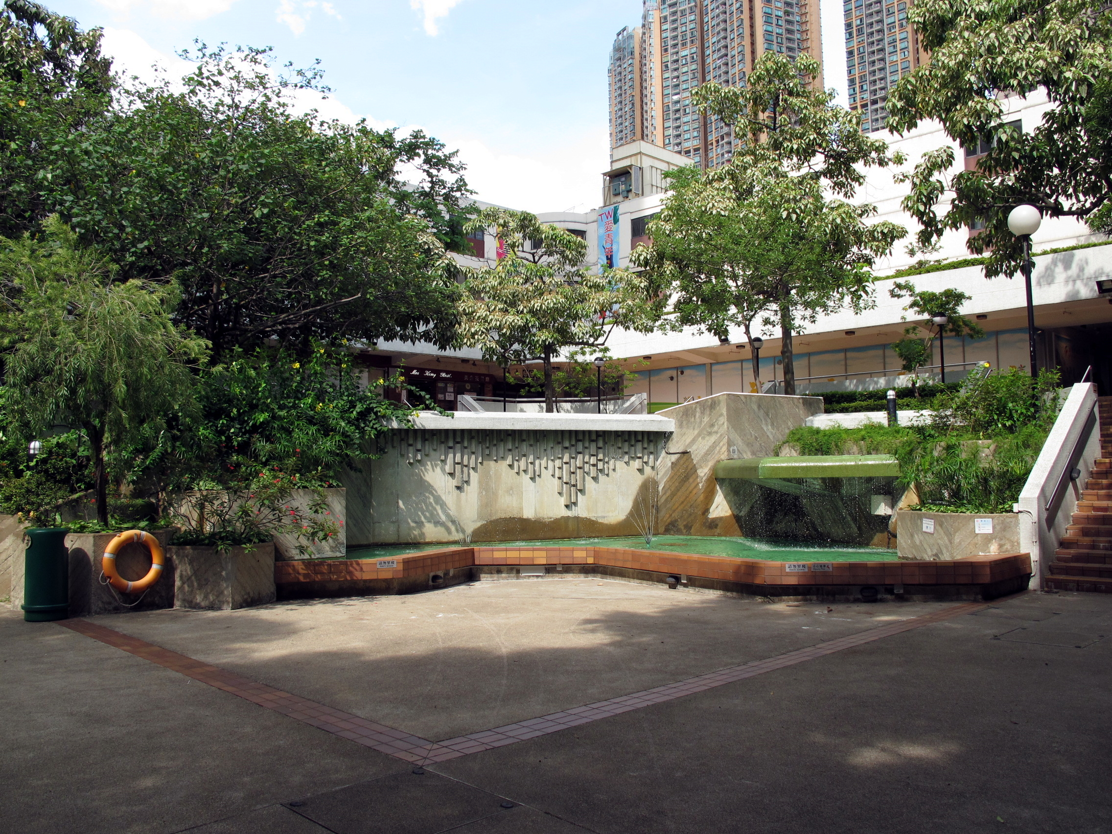 Clague Garden Estate Open space